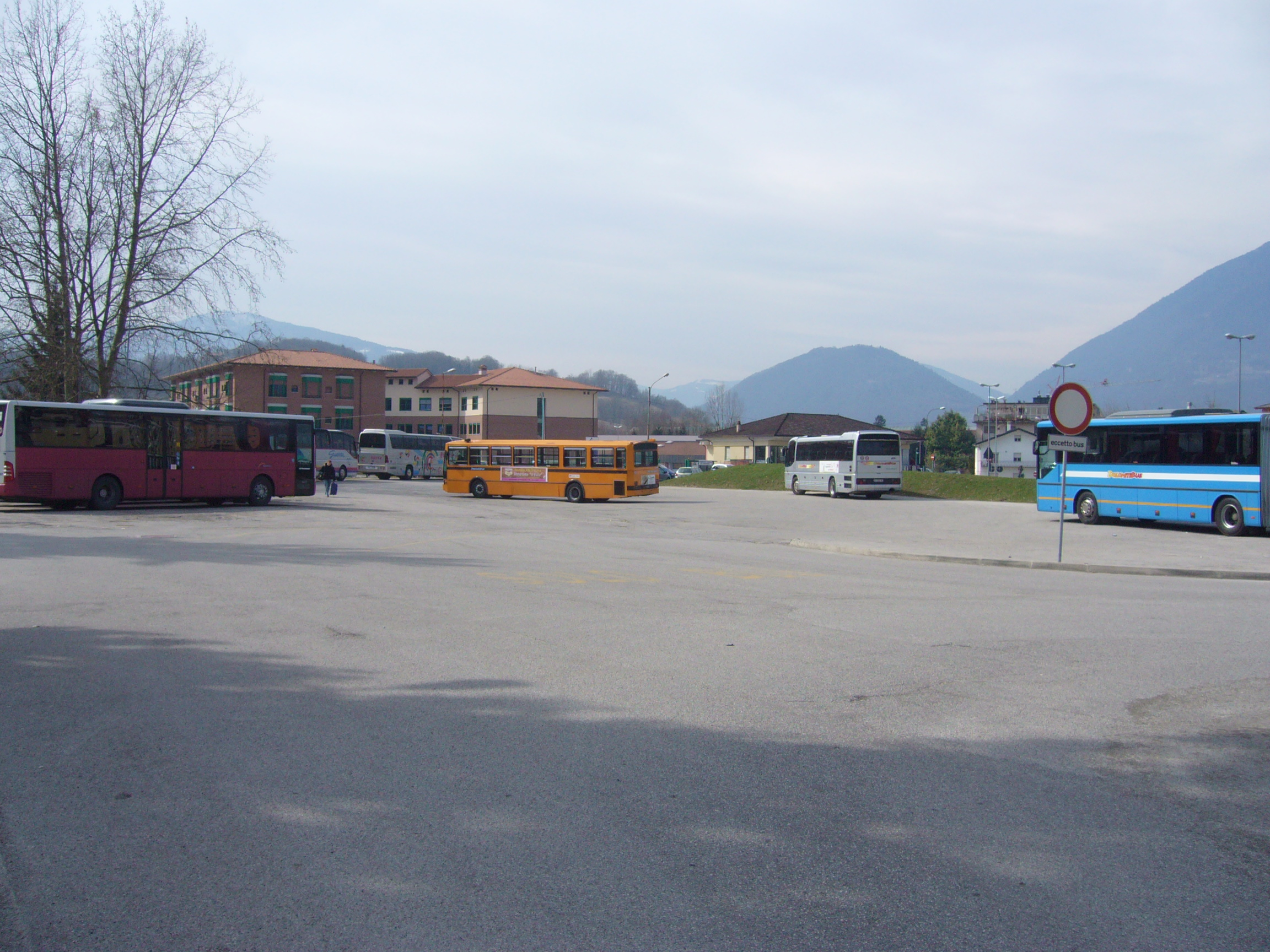 Piazzale degli autobus a fianco della stazione ferroviaria di Feltre